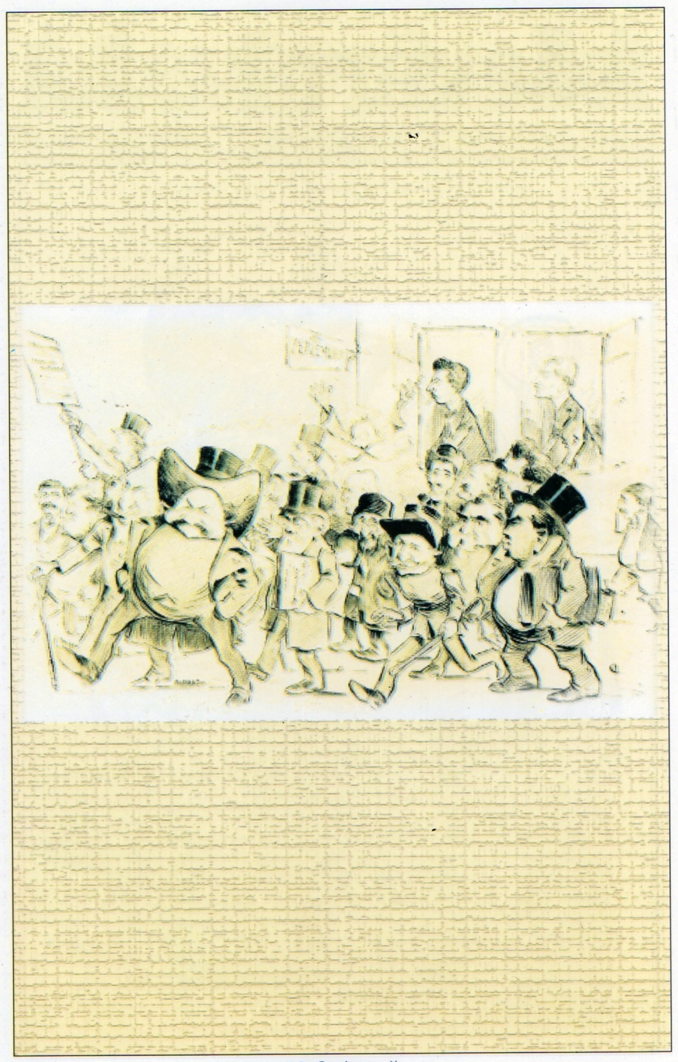 Caricatură în Revista Zeflemeaua